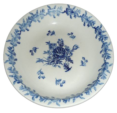 assiette st uze